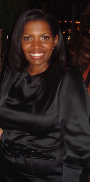 Kara Saun in 2007